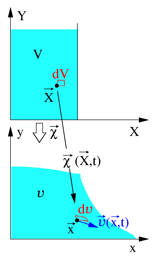 Urbildraum V, der durch die Bewegungsfunktion χ in den Bildraum v transformiert wird